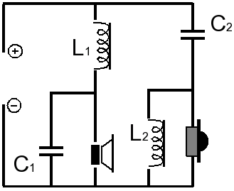 Einfachen 2-Wege-Passiv-Lautsprecher mit Parallelweiche 2. Ordnung